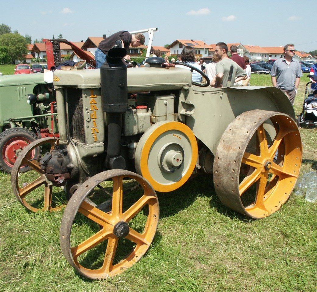 Landini VL30 mit gut sichtbarem Schwungrad